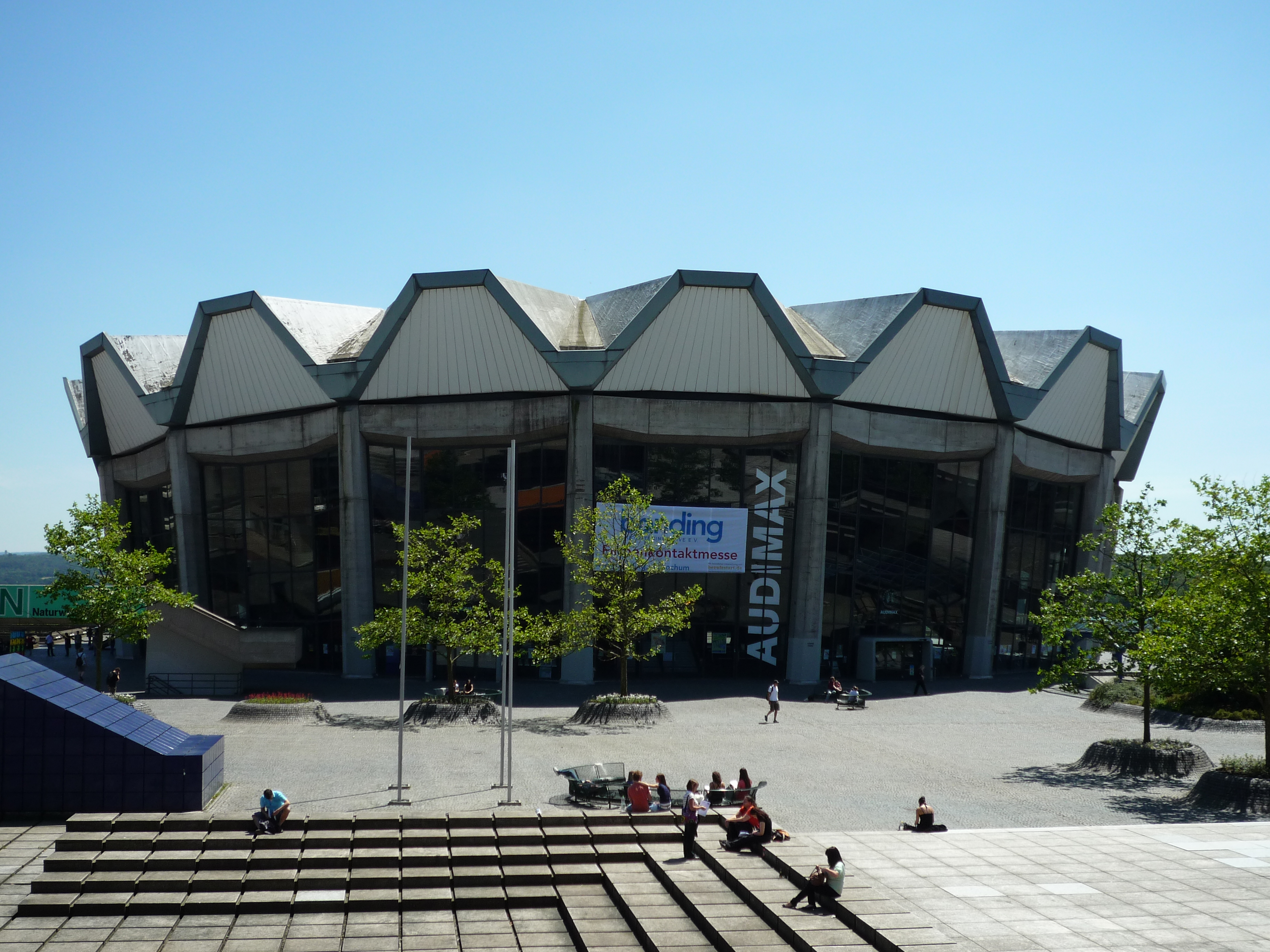 Auditorium Maximum (Audimax) der Ruhr-Universität Bochum